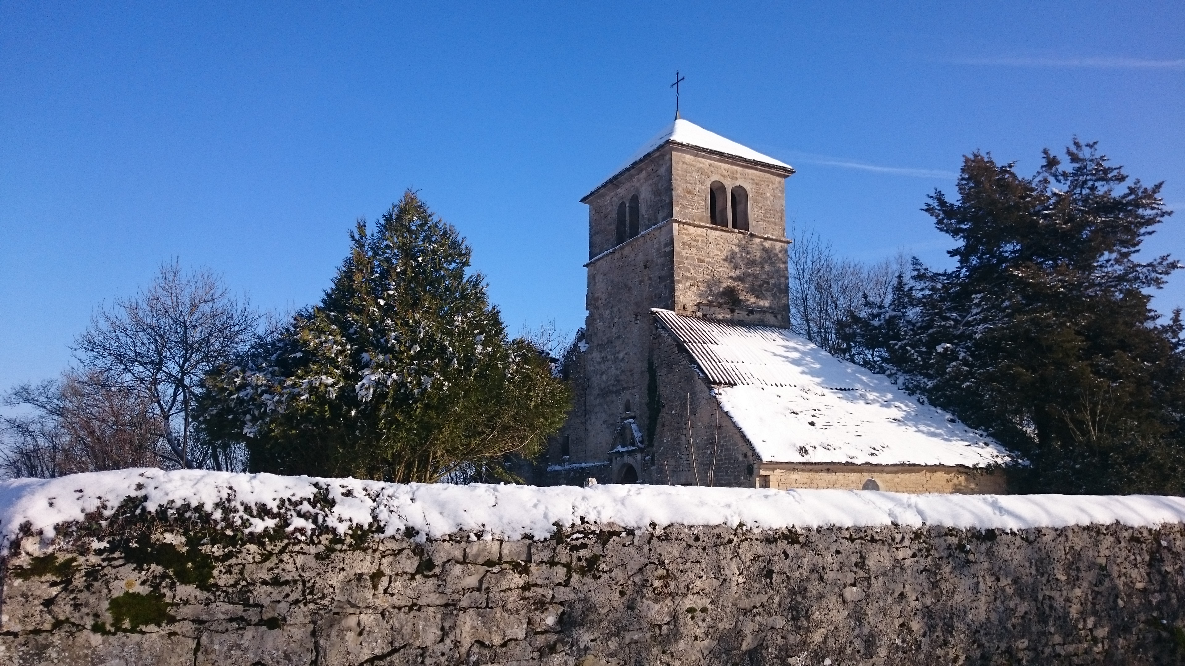 Ruine Eglise Sézéria